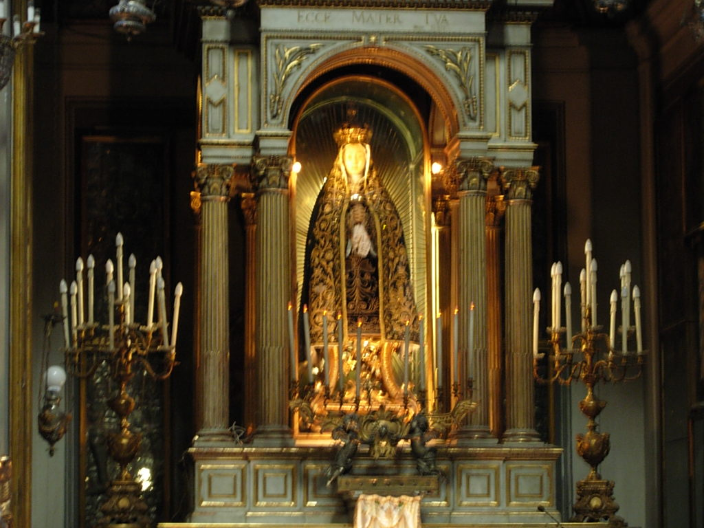 Chiesa di Santa Brigida in Napoli Foto personale Concesso in Pubblico Dominio